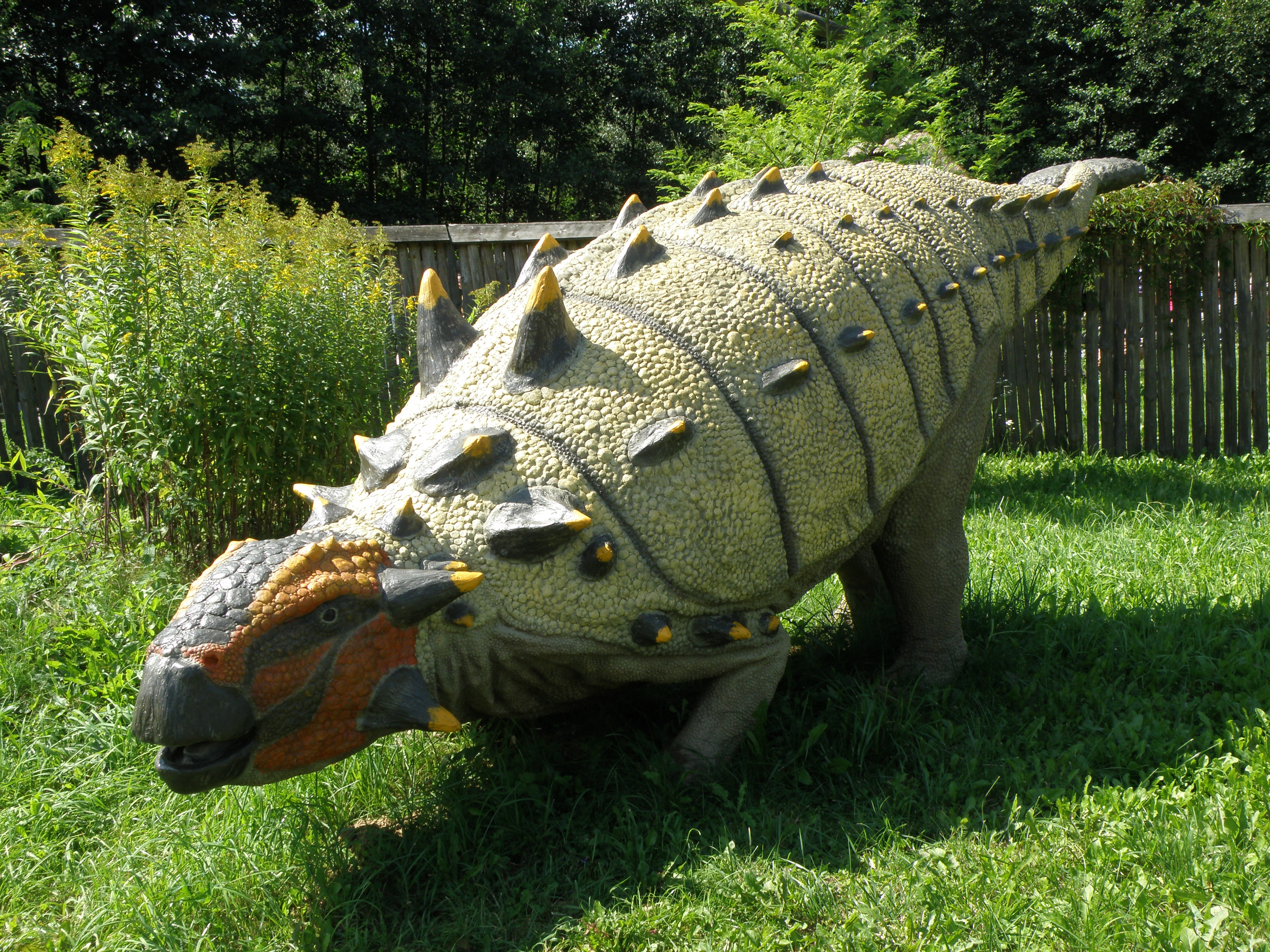 JuraPark Bałtów - Park Dinozaurów - Euoplocefal (Euoplocephalus)